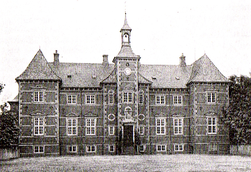 Rugård er en gammel kongsgård, som nævnes første gang i 1472. Rugaard ligger i Veflinge Sogn, Skovby Herred, Søndersø Kommune. Hovedbygningen er opført i 1874 ved Knud Borring.